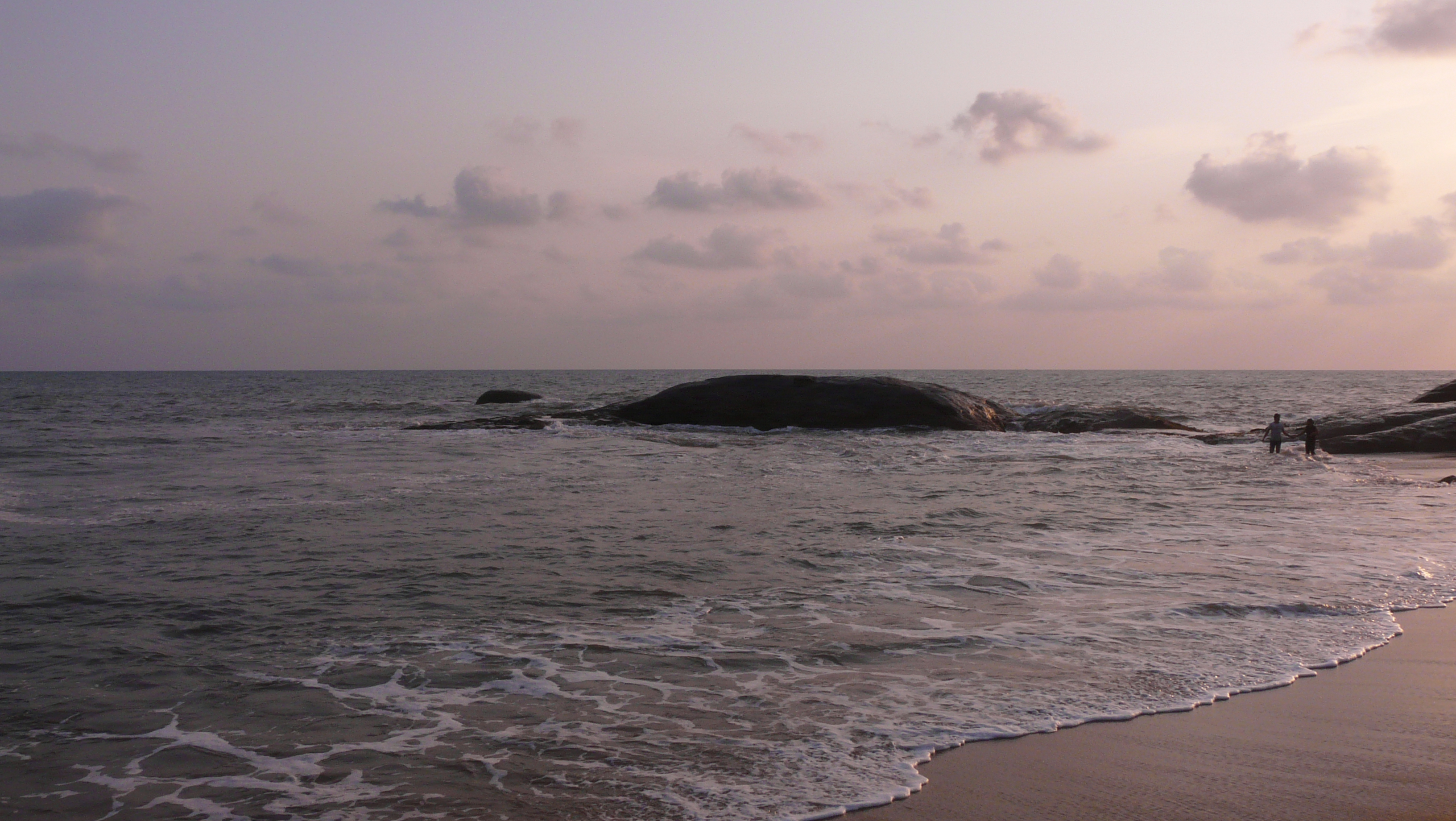 Someshwar Beach